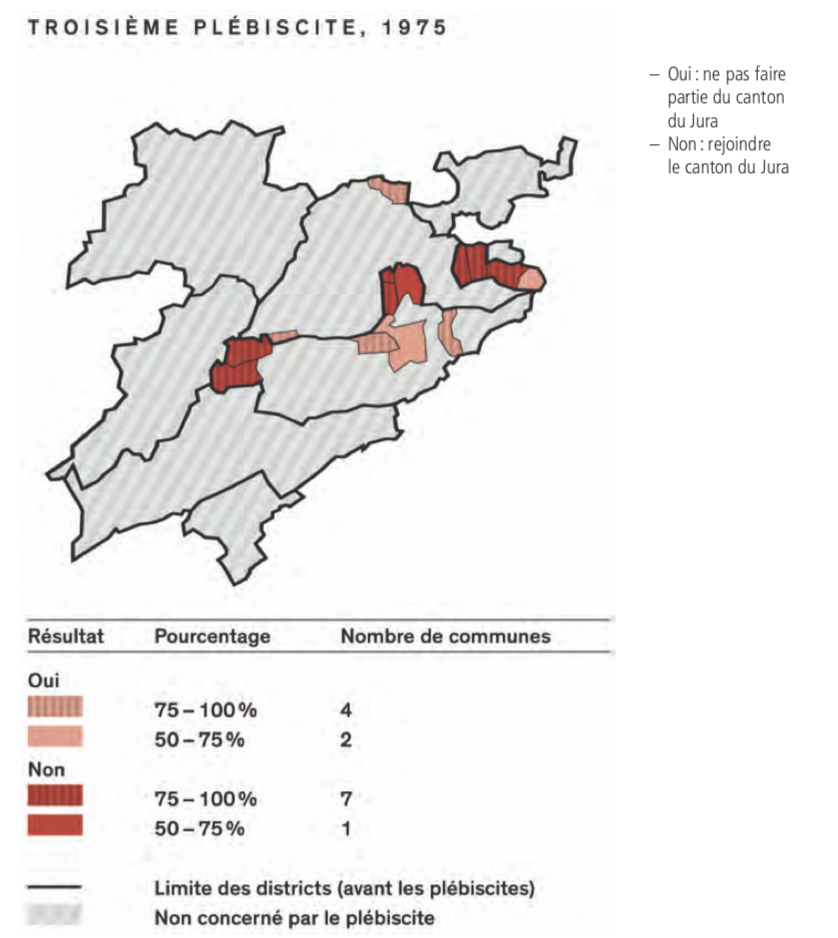 Résultat du troisième plébiscite d'automne 1975.